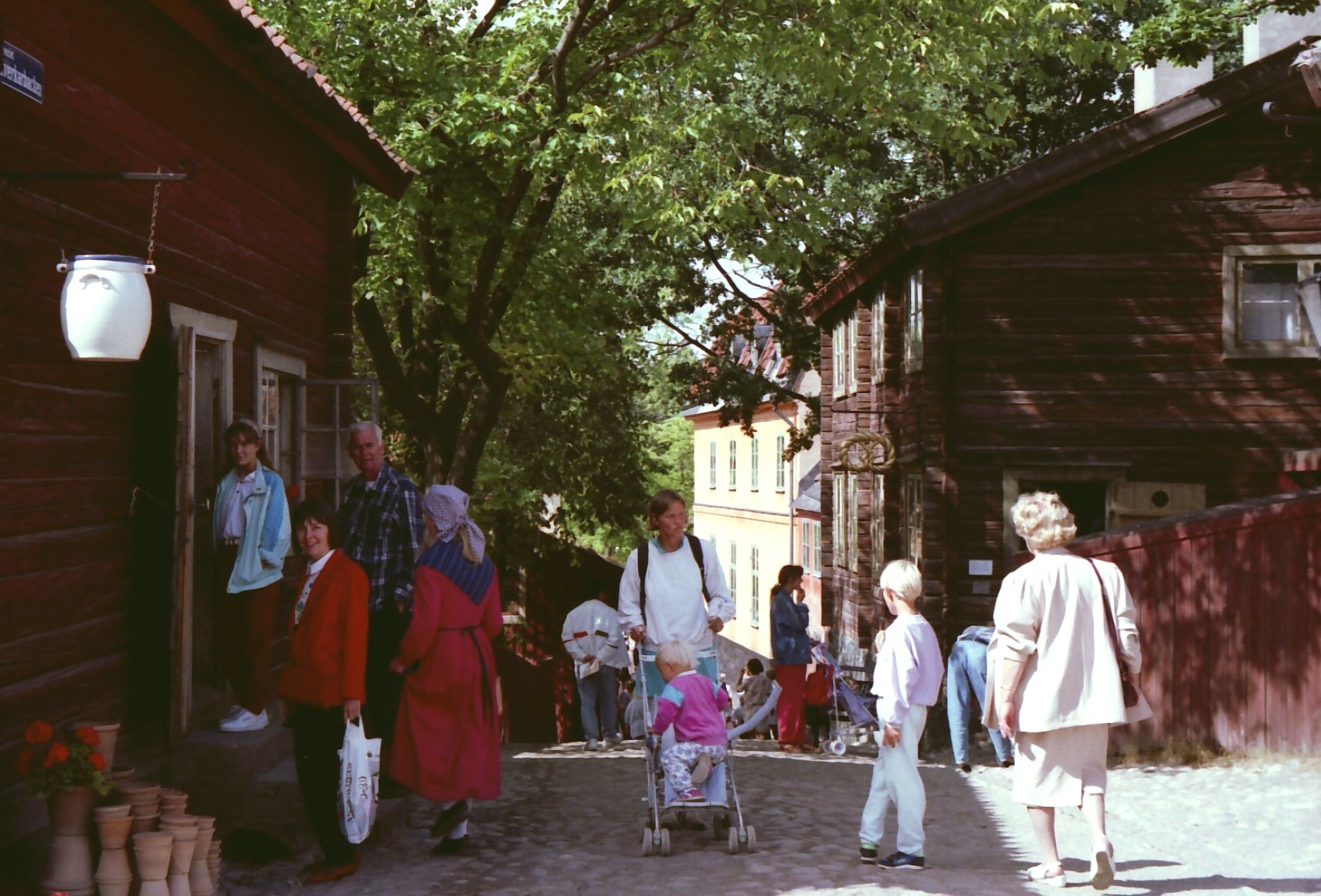 Stadskvarteren på Skansen, Stockholm